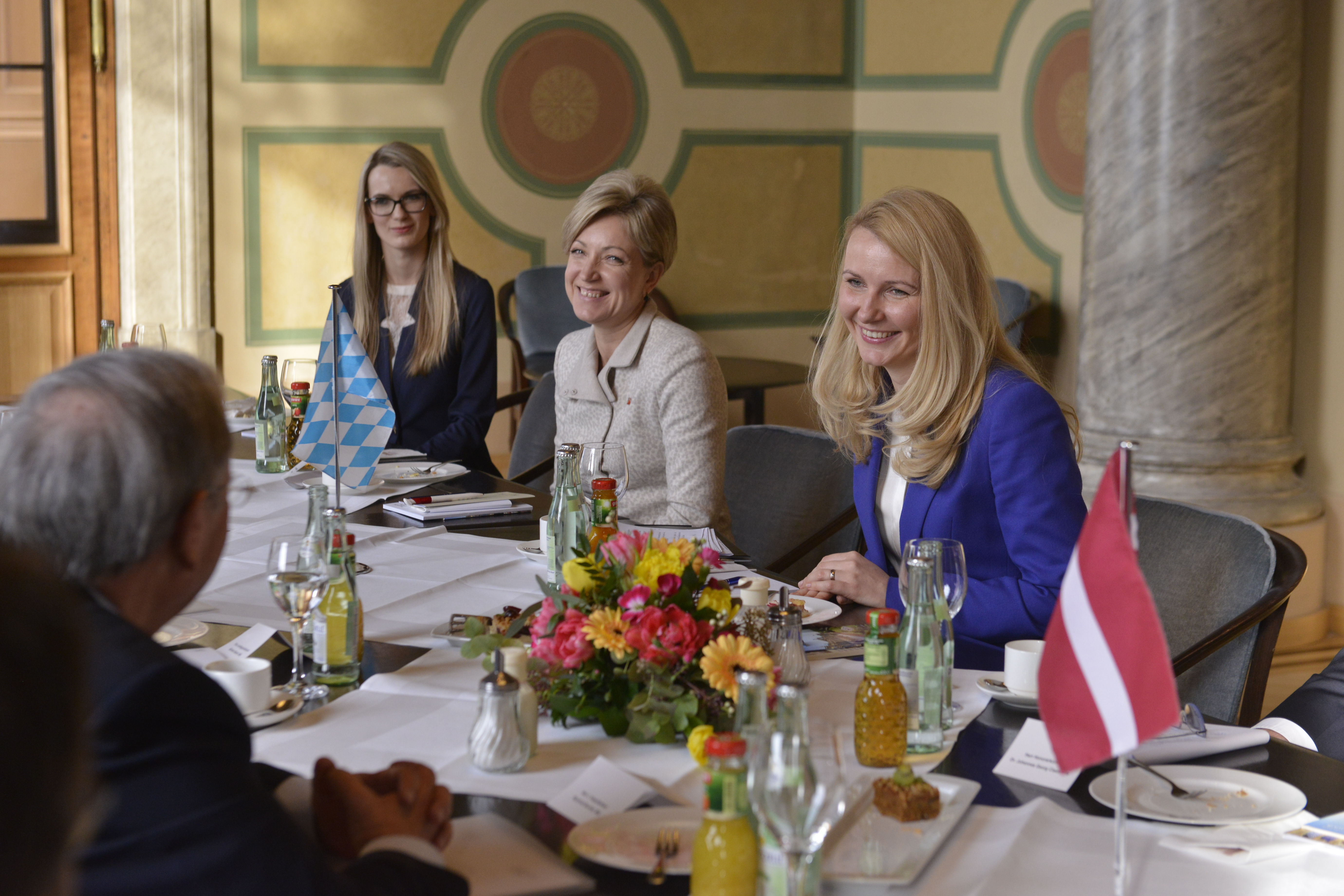 2015.gada 16.marts. Saeimas priekšsēdētājas biedre Inese Lībiņa-Egnere Minhenē tiekas ar Bavārijas federālās zemes parlamenta (landtāga) prezidenti Barbaru Štammu (Barbara Stamm) Foto: Juris Vīgulis, Saeimas Kanceleja Izmantošanas noteikumi: saeima.lv/lv/autortiesibas